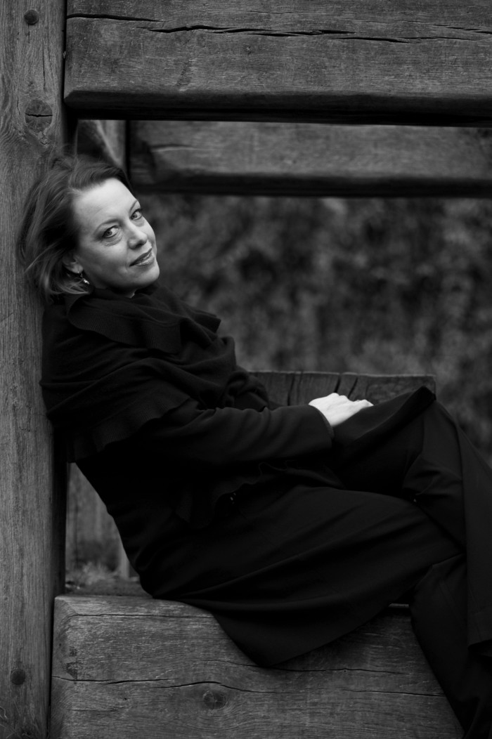 Nina Stemme i operan Notorious vid GöteborgsOperan. Fotograf: Neda Navaee.